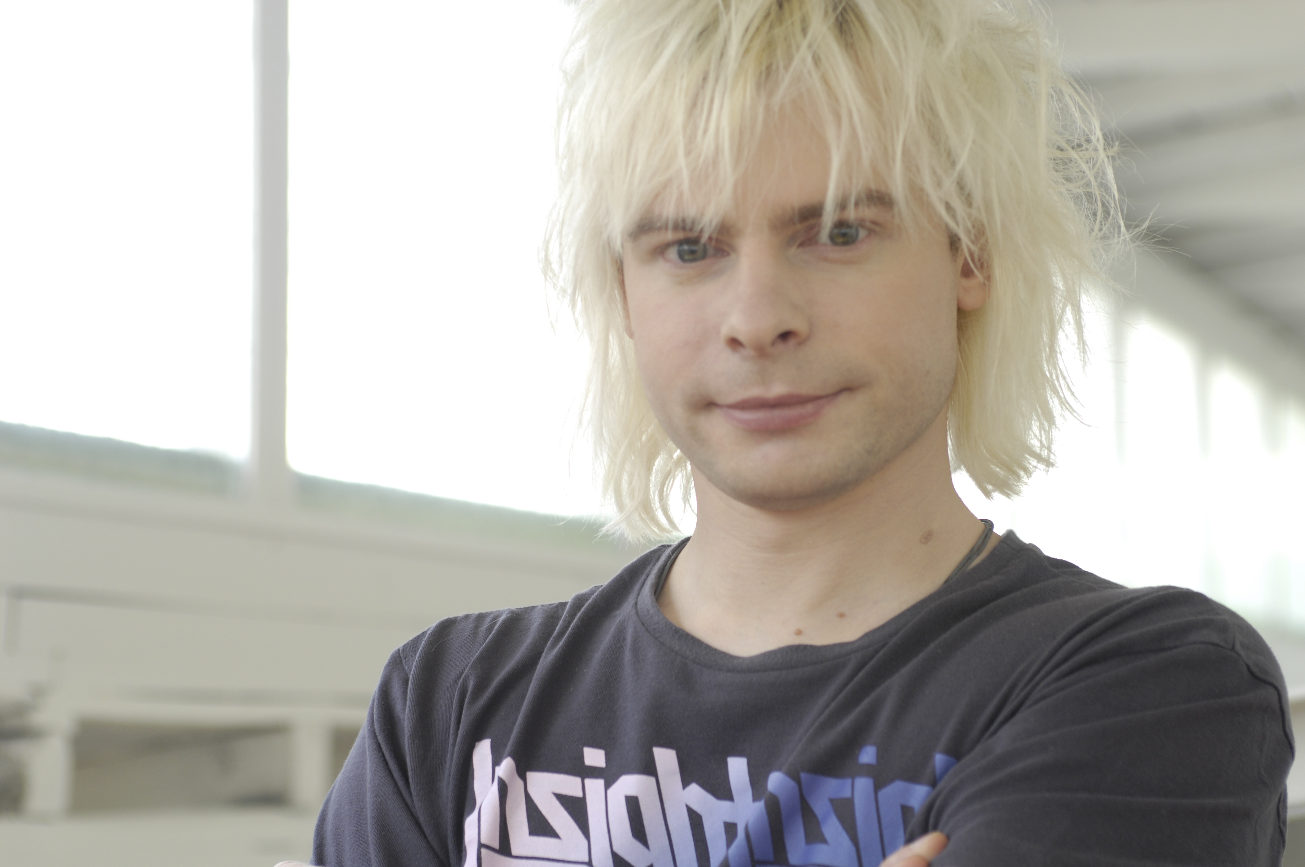 J.-C. Zeller